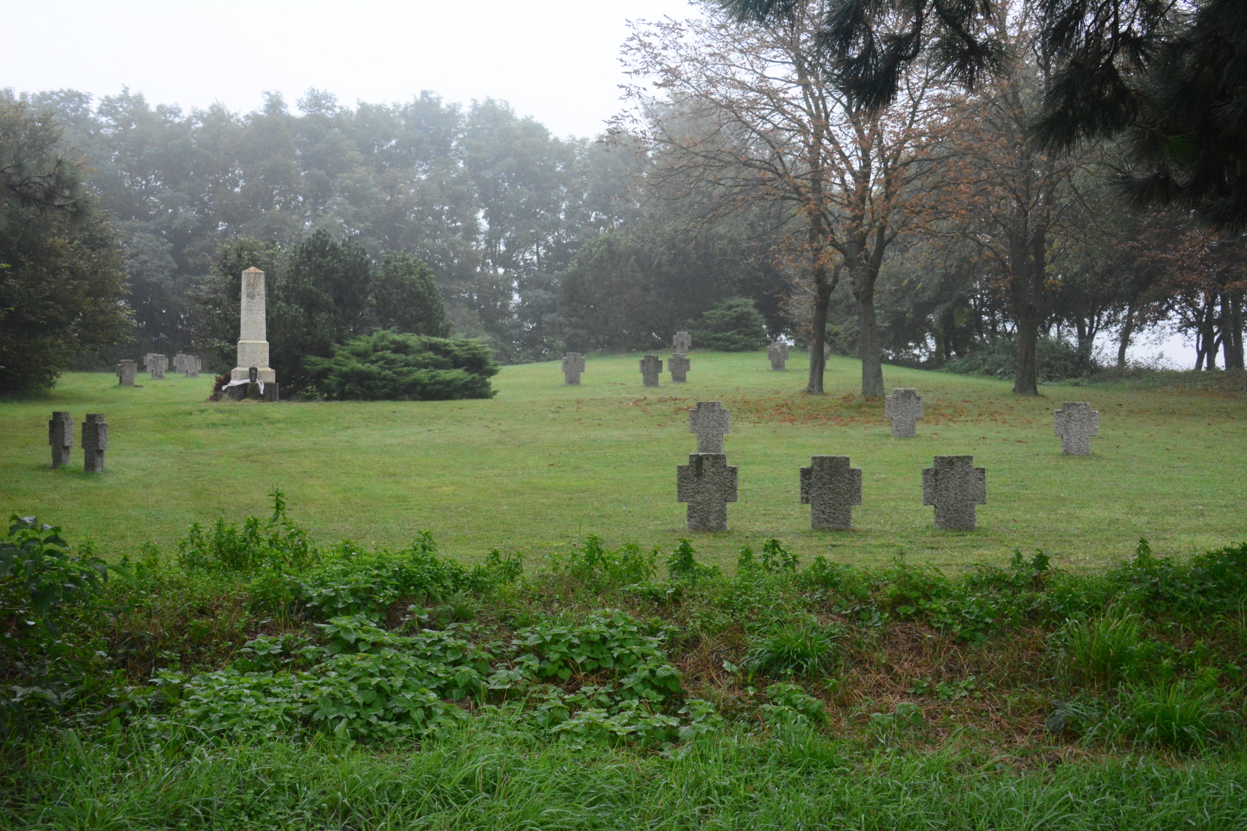 Kriegsgefangenenfriedhof Haschendorf in Neckenmarkt (Katastralgemeinde Haschendorf), Erster Weltkrieg